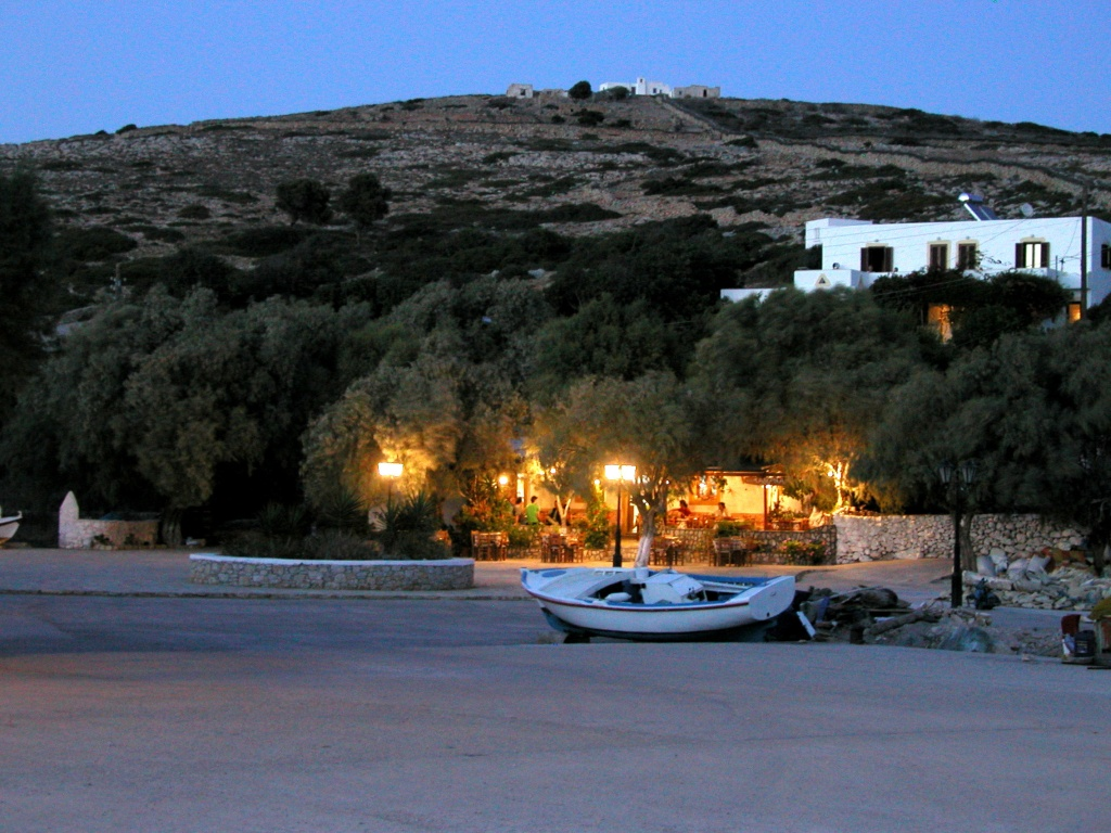 Hafen Porto Augusta auf Arki, fotografiert am 17.9.2004